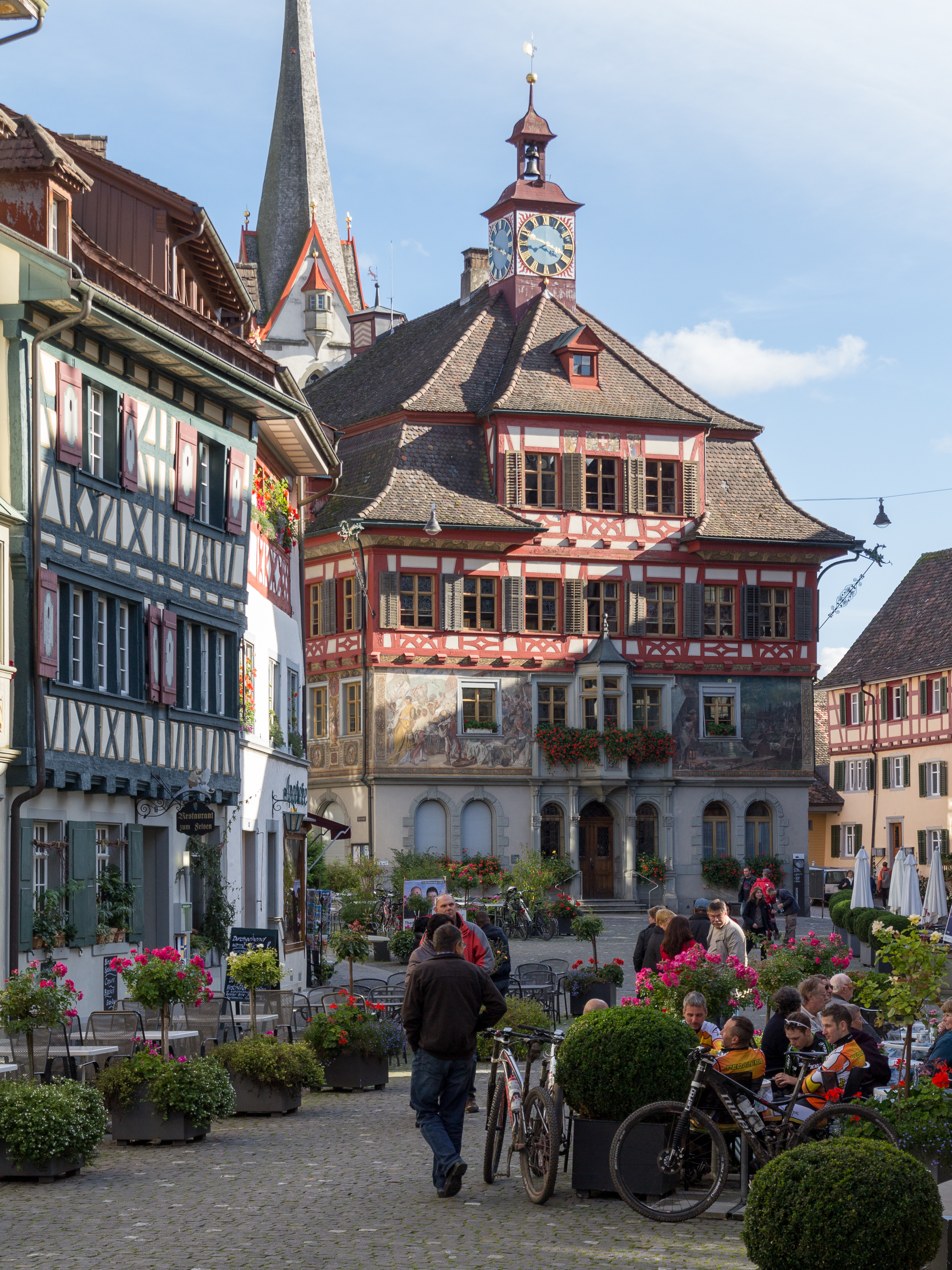 Rathaus und Rathausplatz